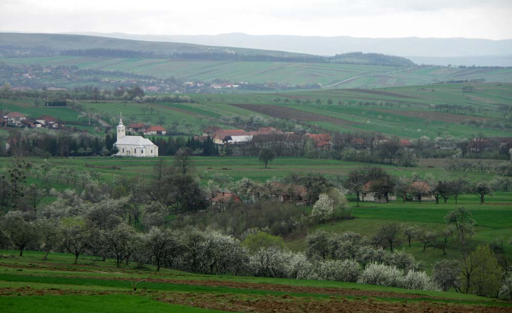 Biserica din Mal, Sălaj. De pe deal.